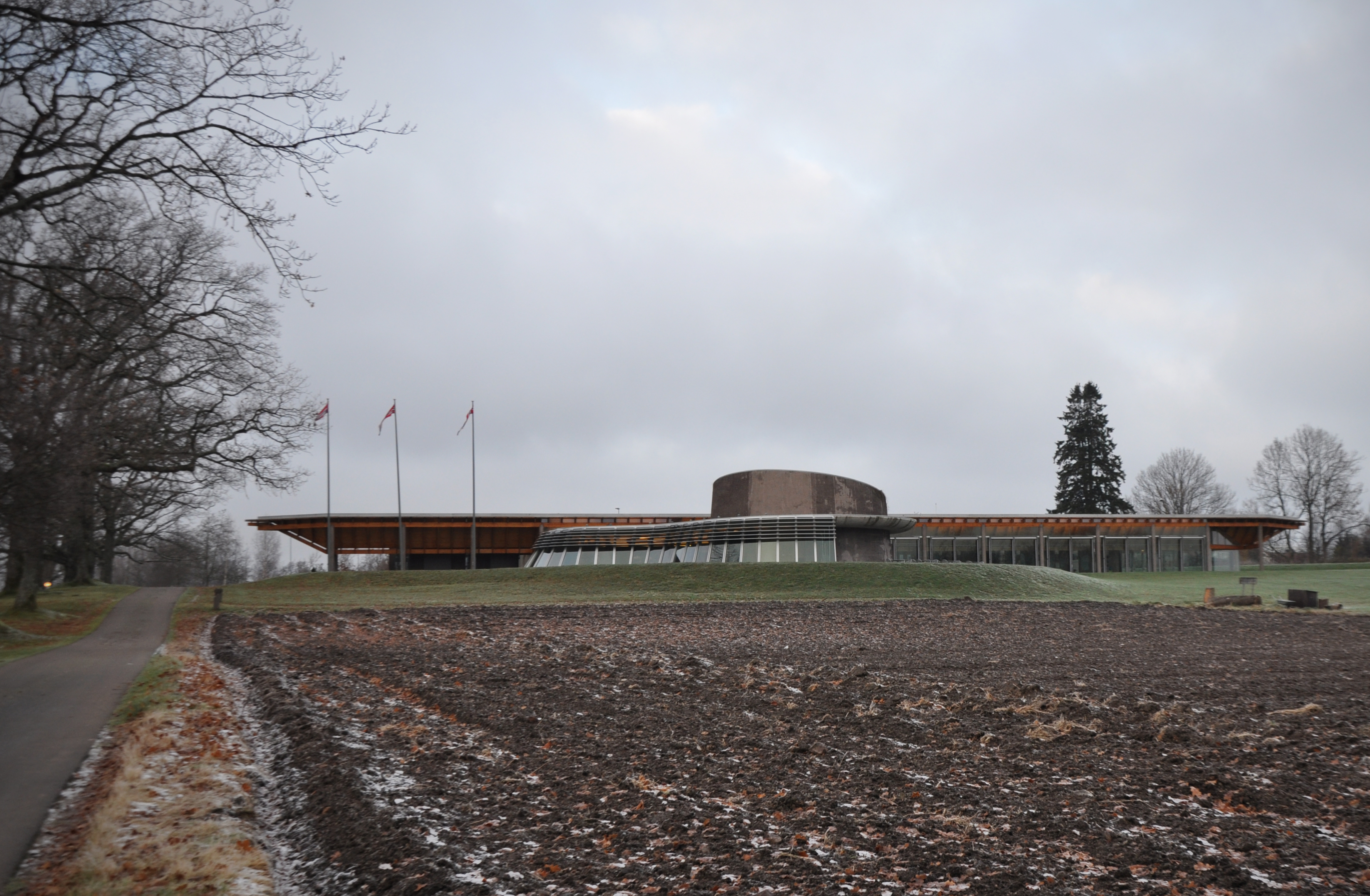 Midgård, historiskt centrum vid gravhögarna i Borre Nationalpark i Horten, Vestfold, Norway